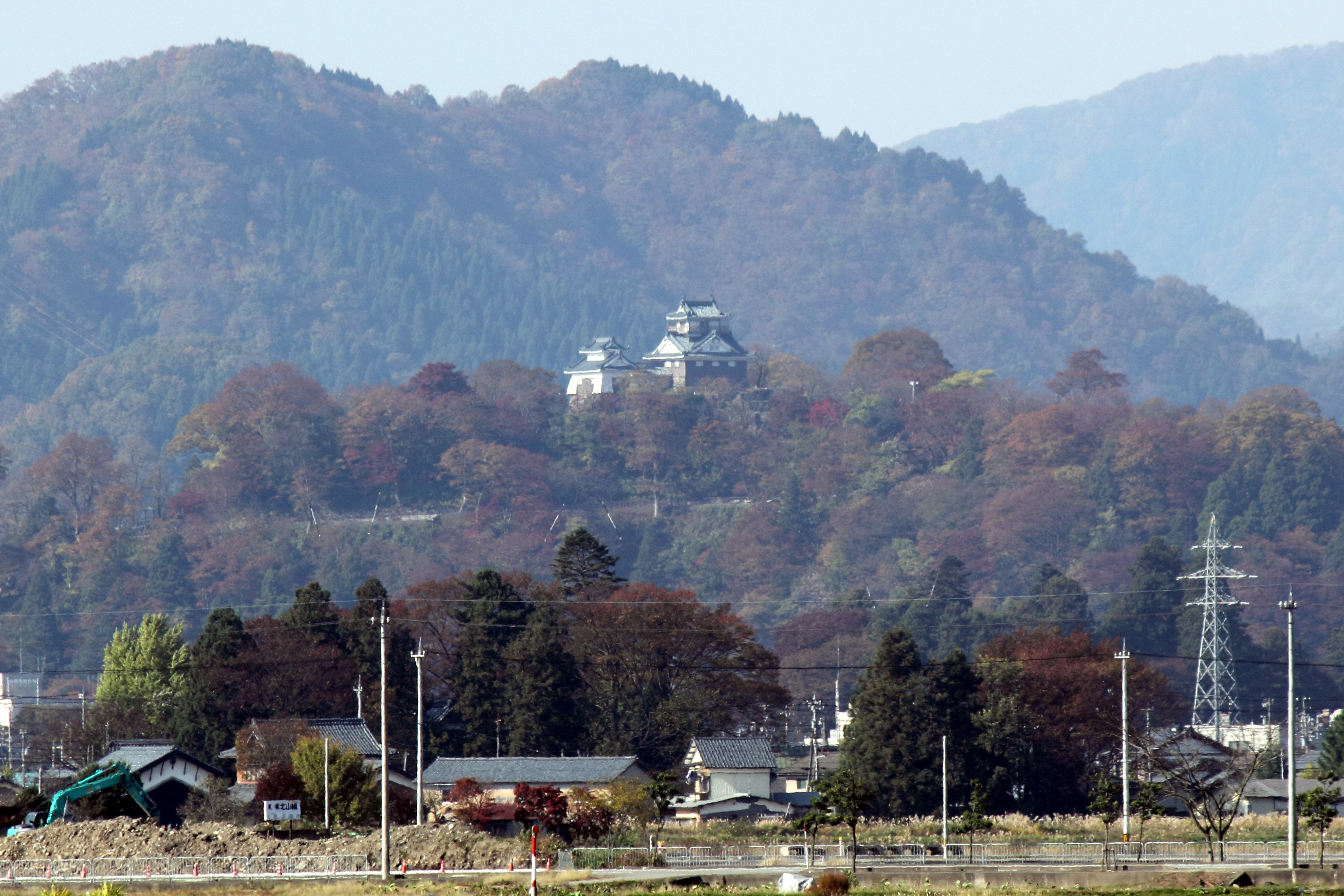 越前大野城 遠望